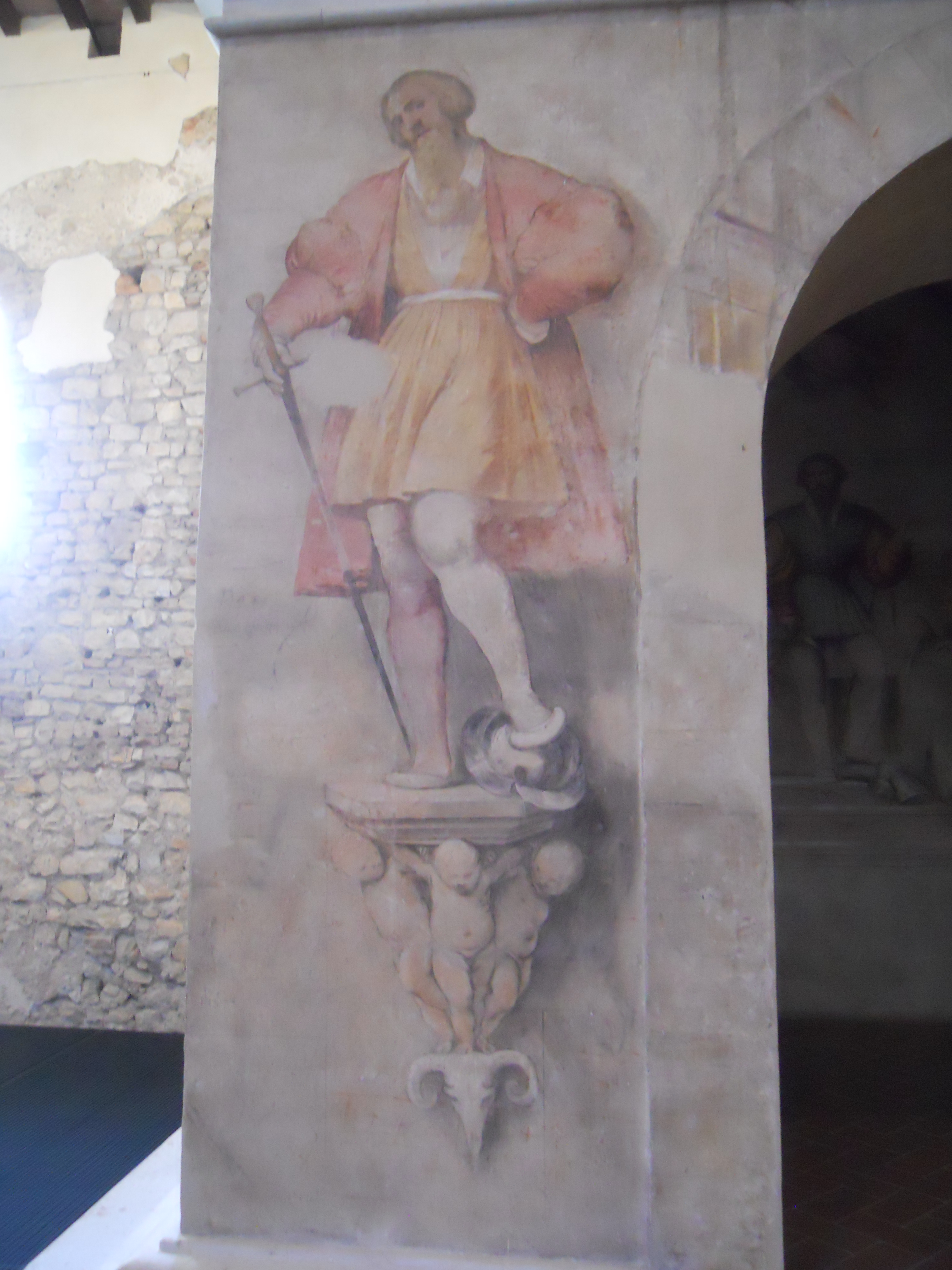 storie di sant'obizio (romanino) chiesa di san salvatore (museo di santa giulia), brescia